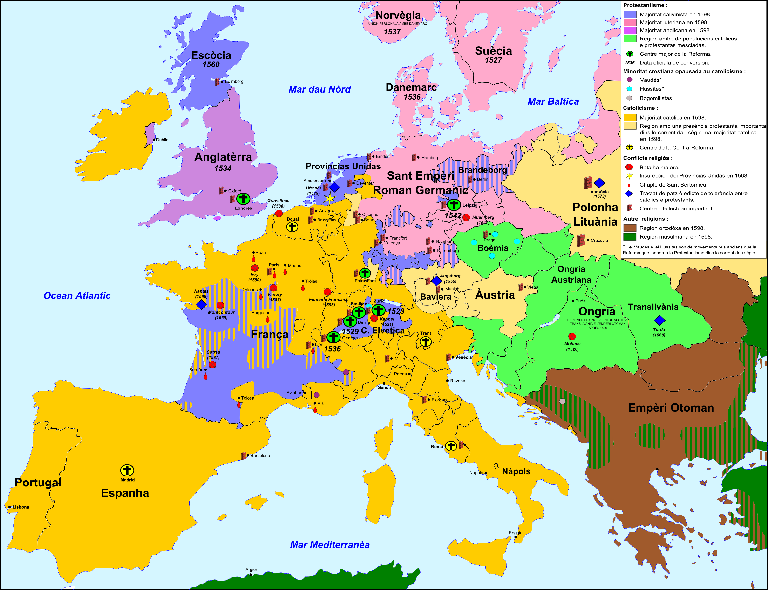 Equilibri religiós en Euròpa a la fin dau sègle XVI.